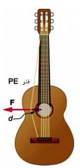 شکل2